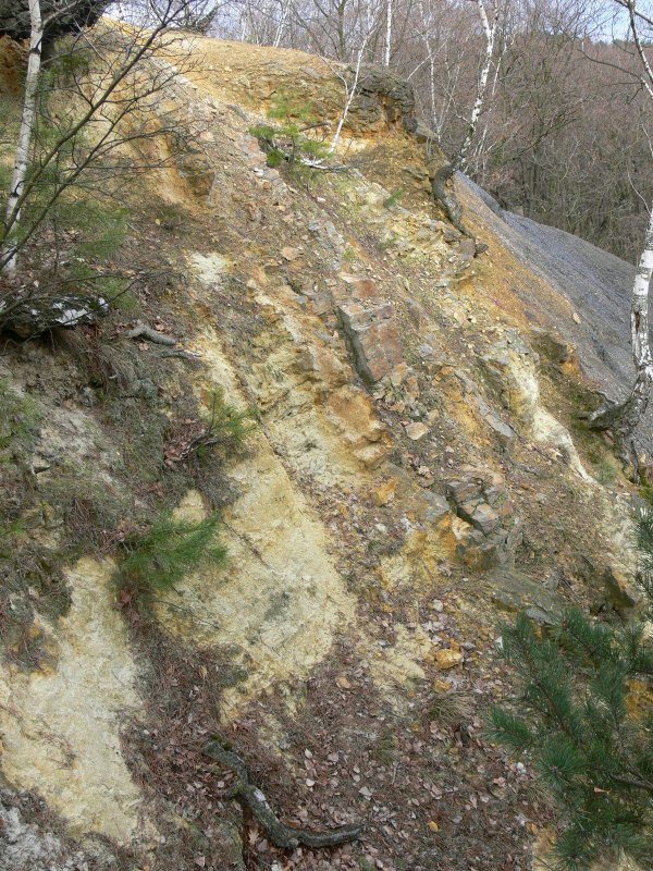 Motolský ordovník